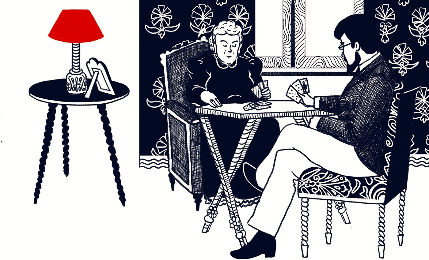 Rappresentazione illustrata di Kletočnikov che gioca a carte con Anna Kutuzova